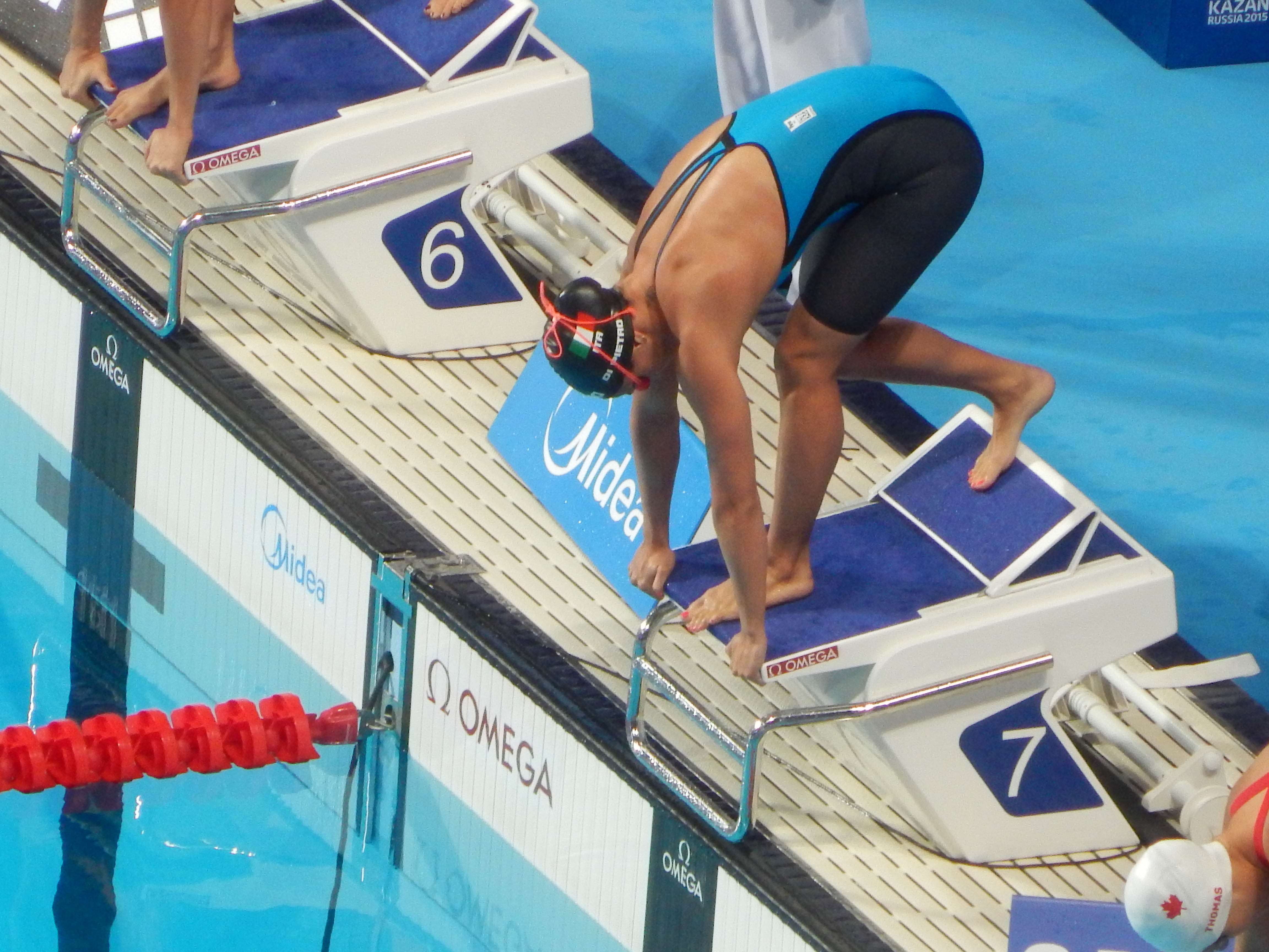 Заплыв на чемпионате мира в Казани баттерфляем 50 метров полуфинал